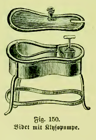 Fig. 150. Bidet mit Klysopumpe.